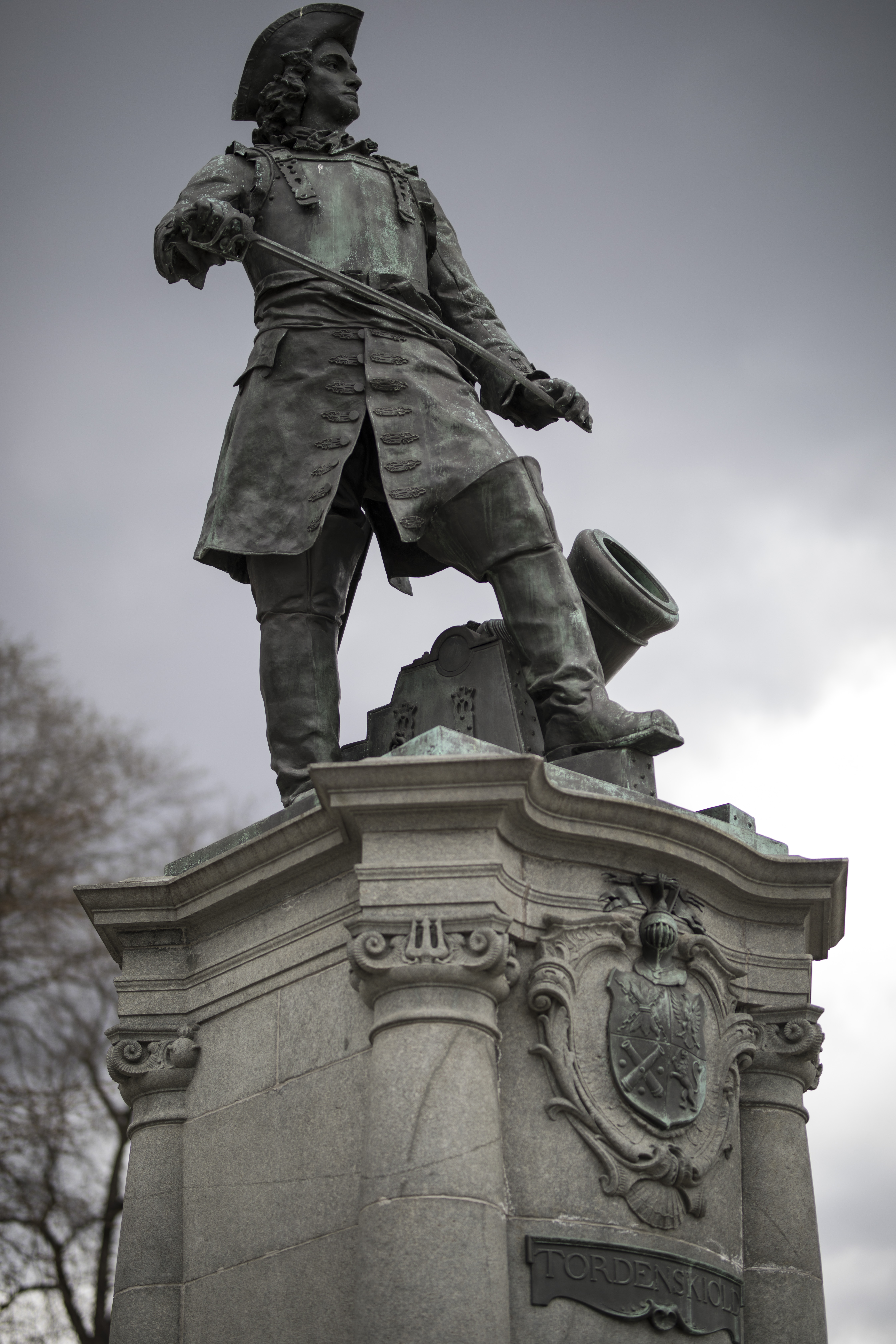 Statuen av Tordenskiold ser ut over rådhusplassen. Biledhugger: Axel Ender. Oppført 1901.